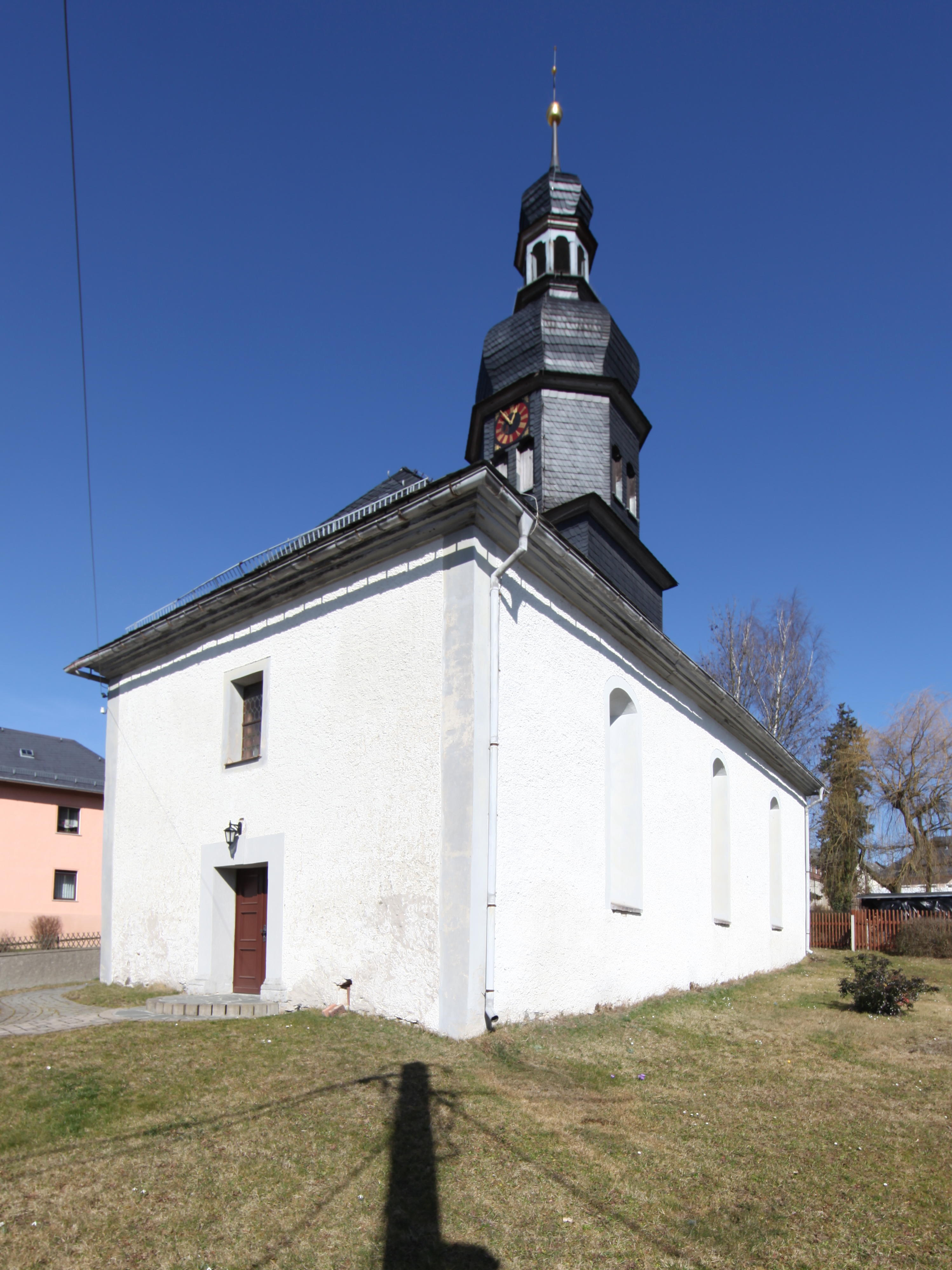 Schilbach-Ev-Kirche